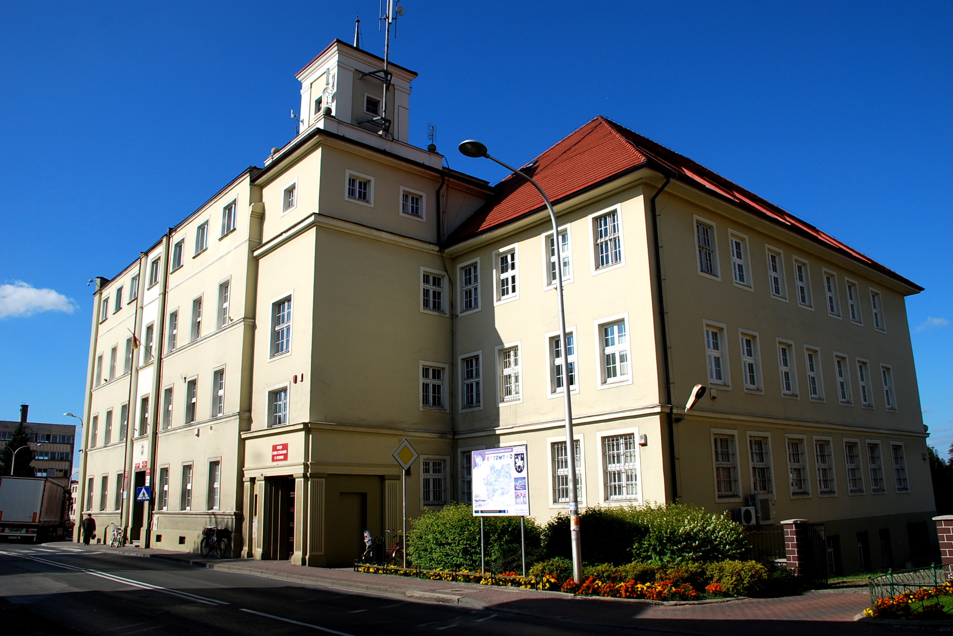 Sycowski ratusz